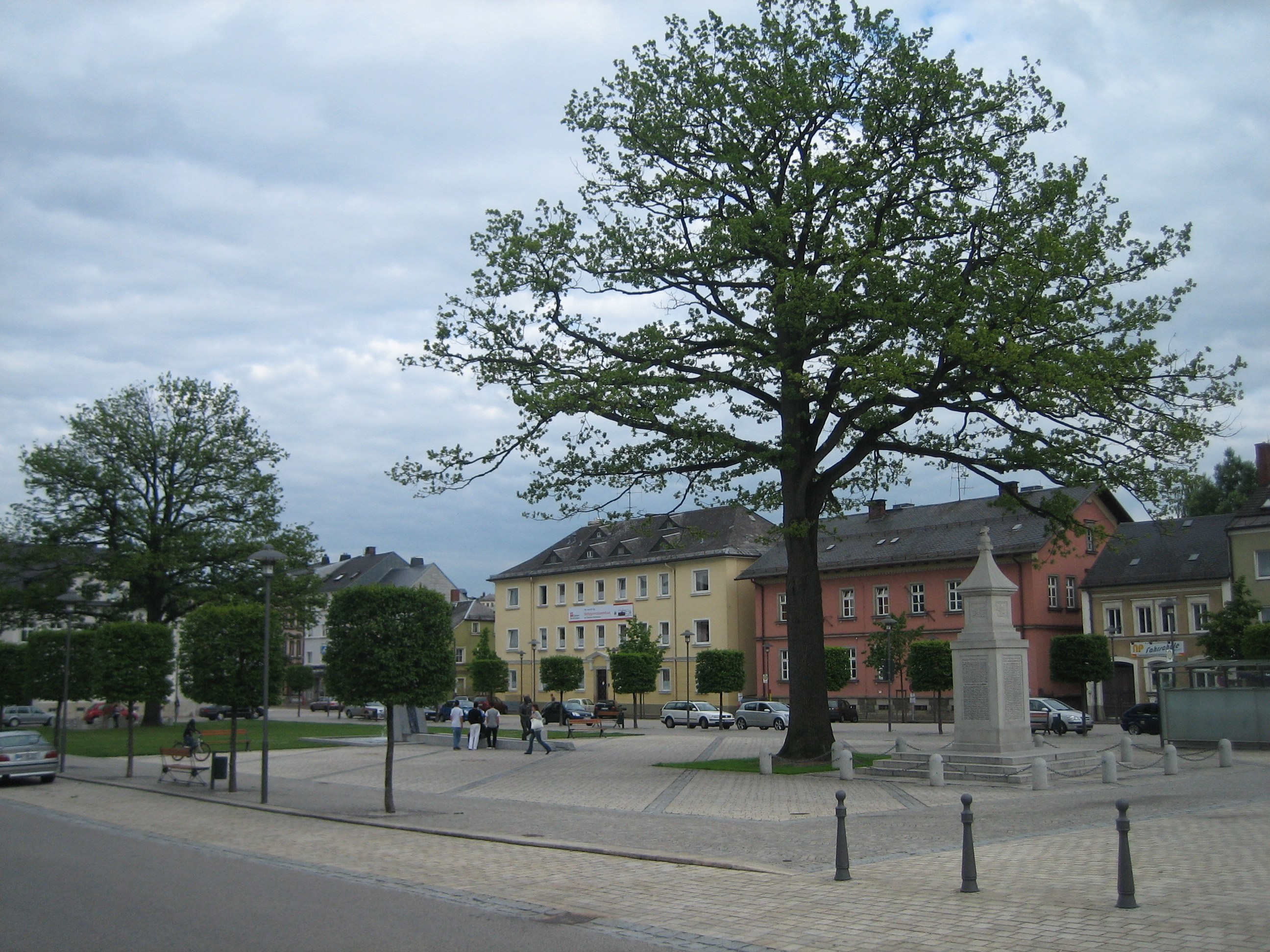 Maxplatz in Rehau mit Denkmal für die Gefallenen des Krieges 1914/18